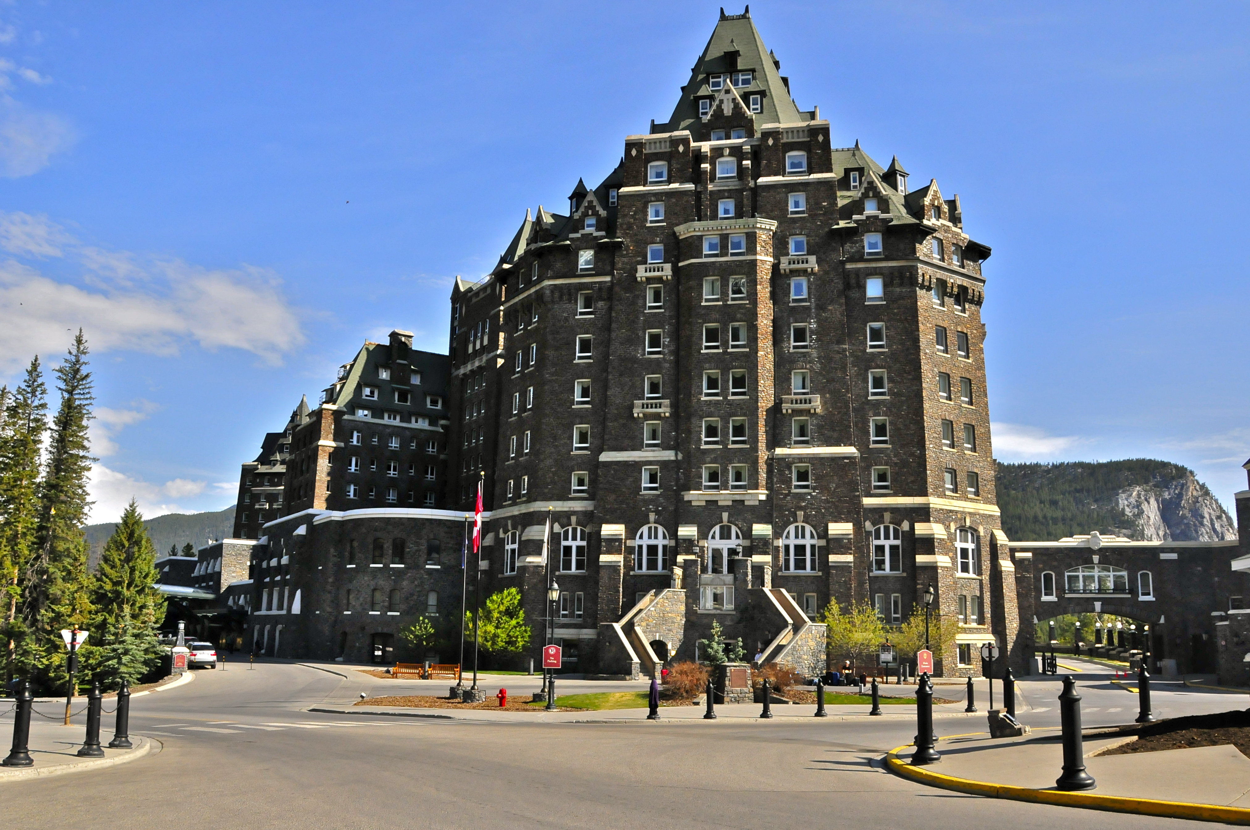 Banff Springs Hotel